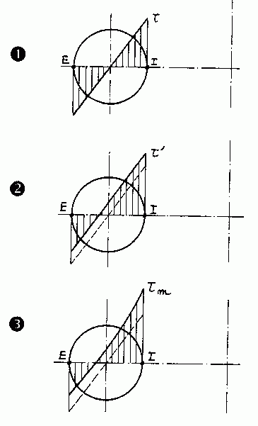 contraintes tangentielles Dessin original de Jean-Jacques MILAN, reproduction libre